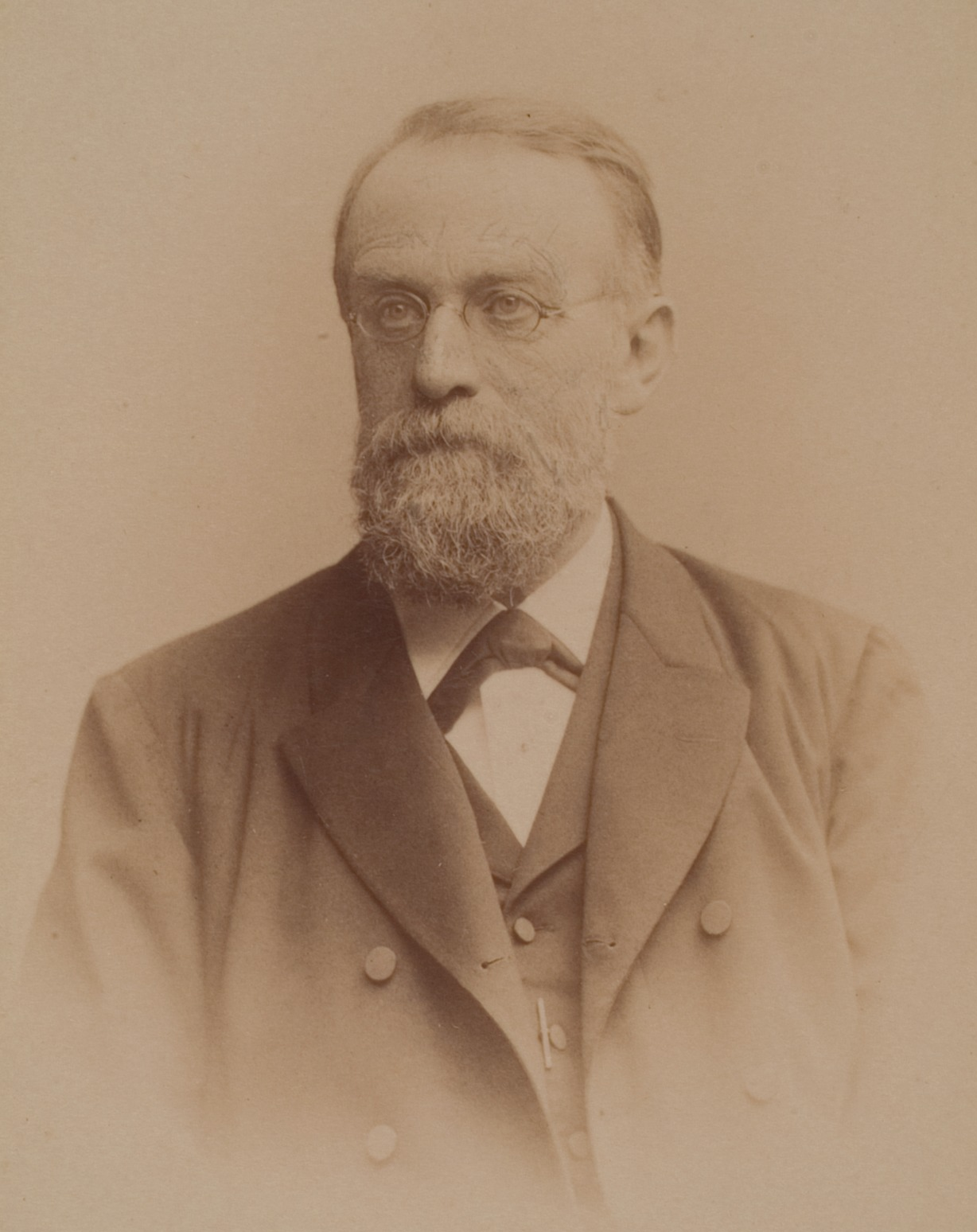 Friedrich Eisenlohr, Mathematiker und Physiker, 1872–1904 Professor in Heidelberg